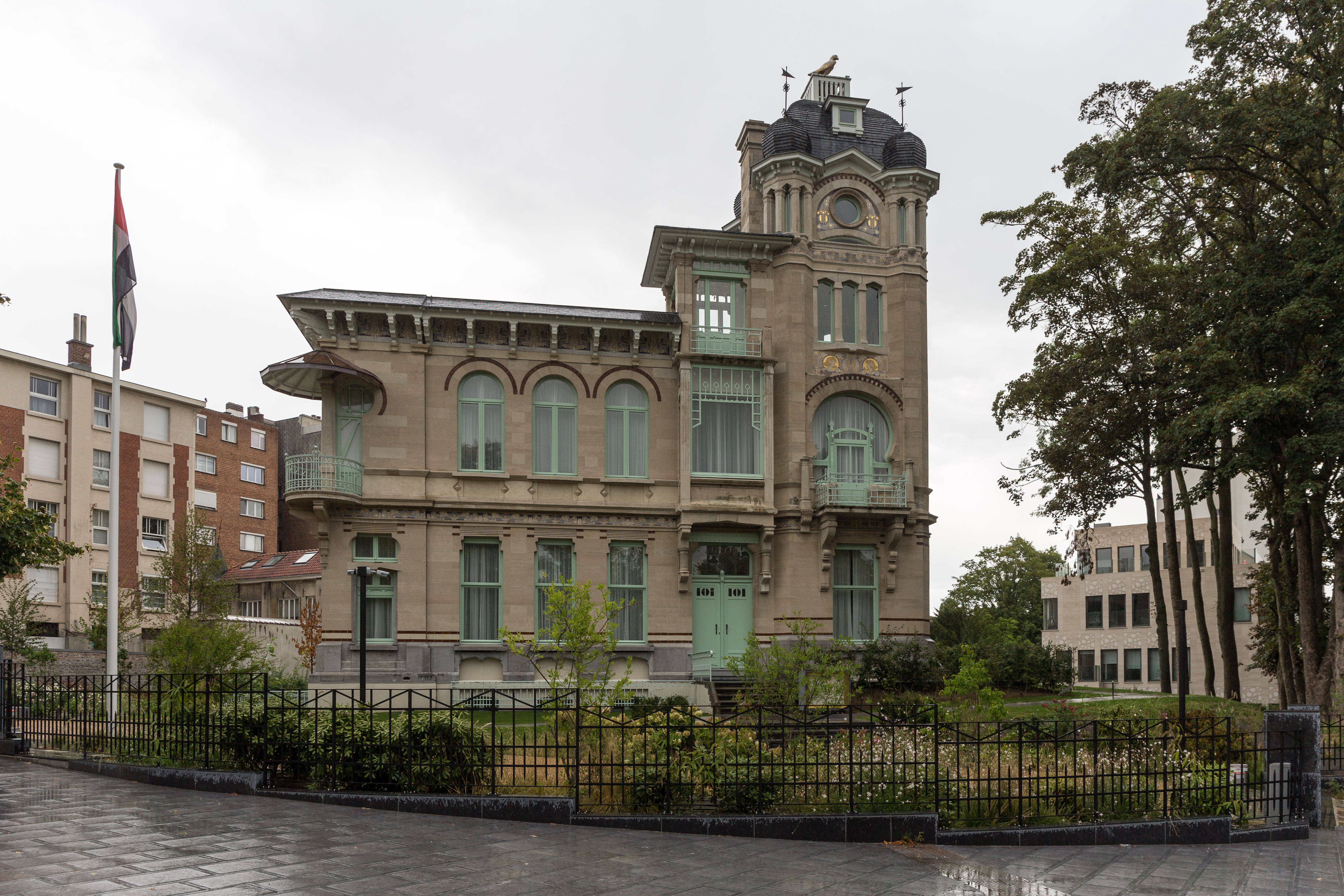 Ambassade des Émirats arabes unis en Belgique, avenue Franklin Roosevelt 84 à Bruxelles.